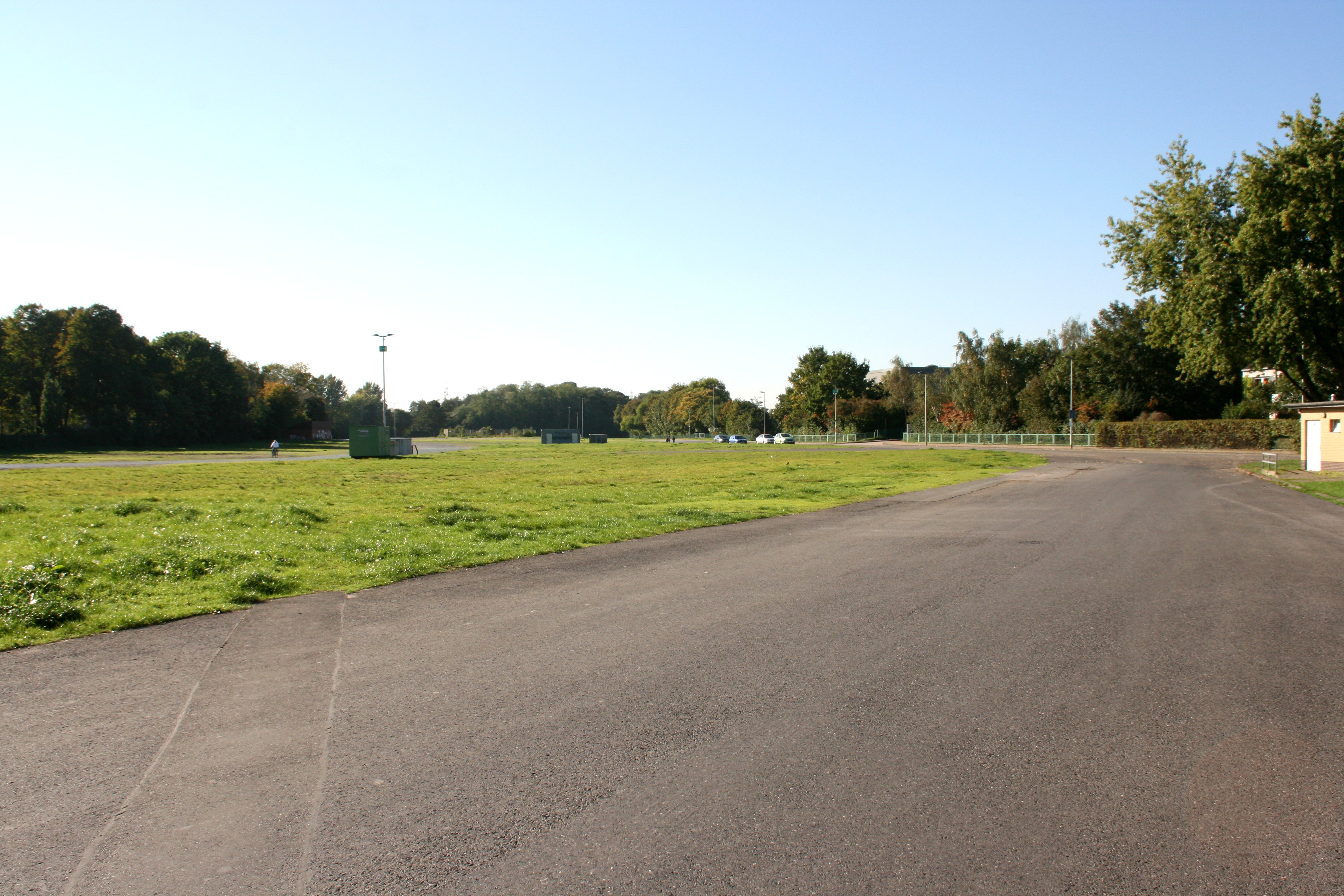 Cranger Kirmesplatz, Altcrange in Herne-Crange